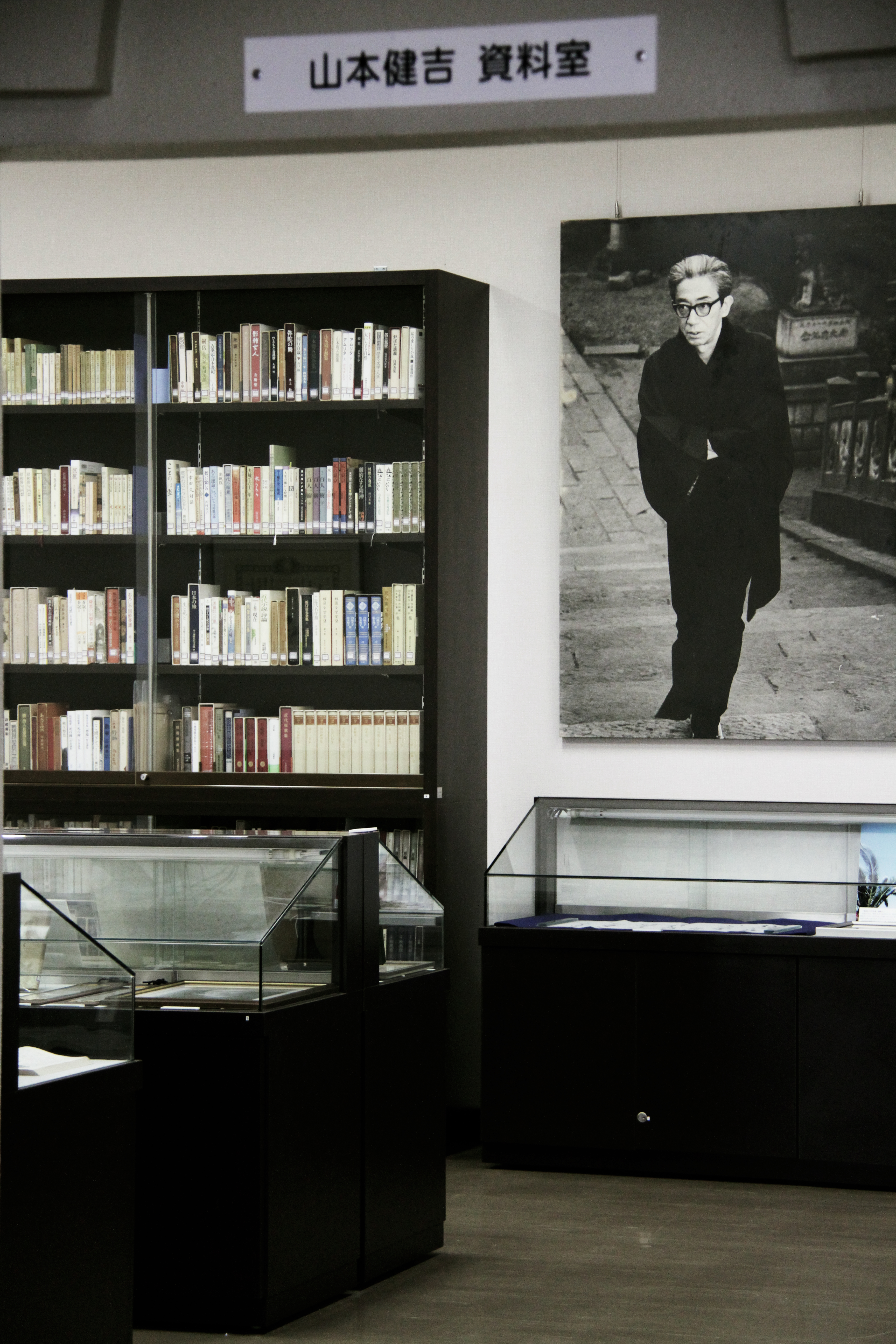 福岡県八女市の八女市立図書館2階にある山本健吉資料室の様子。ここには健吉の資料や石橋秀野の写真や句などが展示してある。